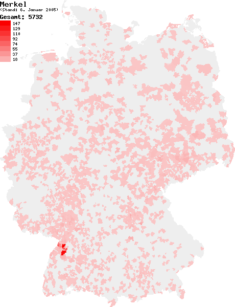 Verteilung des Nachnamens Merkel in Deutschland nach dem Telefonbuch mit Stand vom 6. Januar 2005 Source: selbst erstellt Ersteller: W. Baumgartner